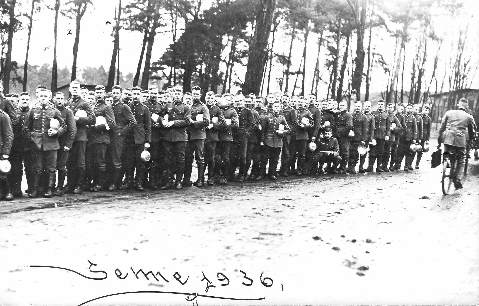 Essenausgabe an Wehrmachtsoldaten auf dem Truppenübungsplatz Sennelager 1936.